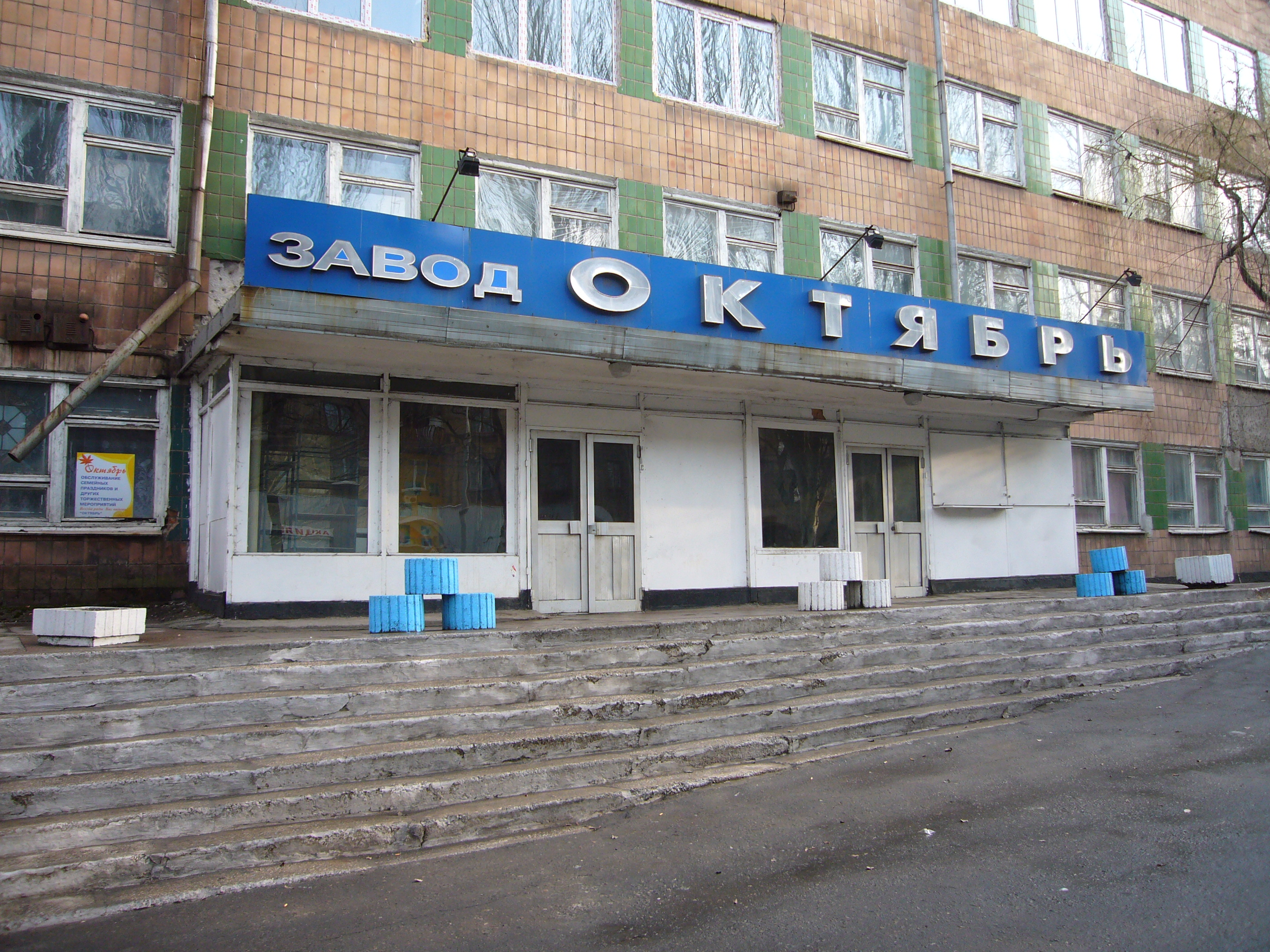 Завод Октябрь